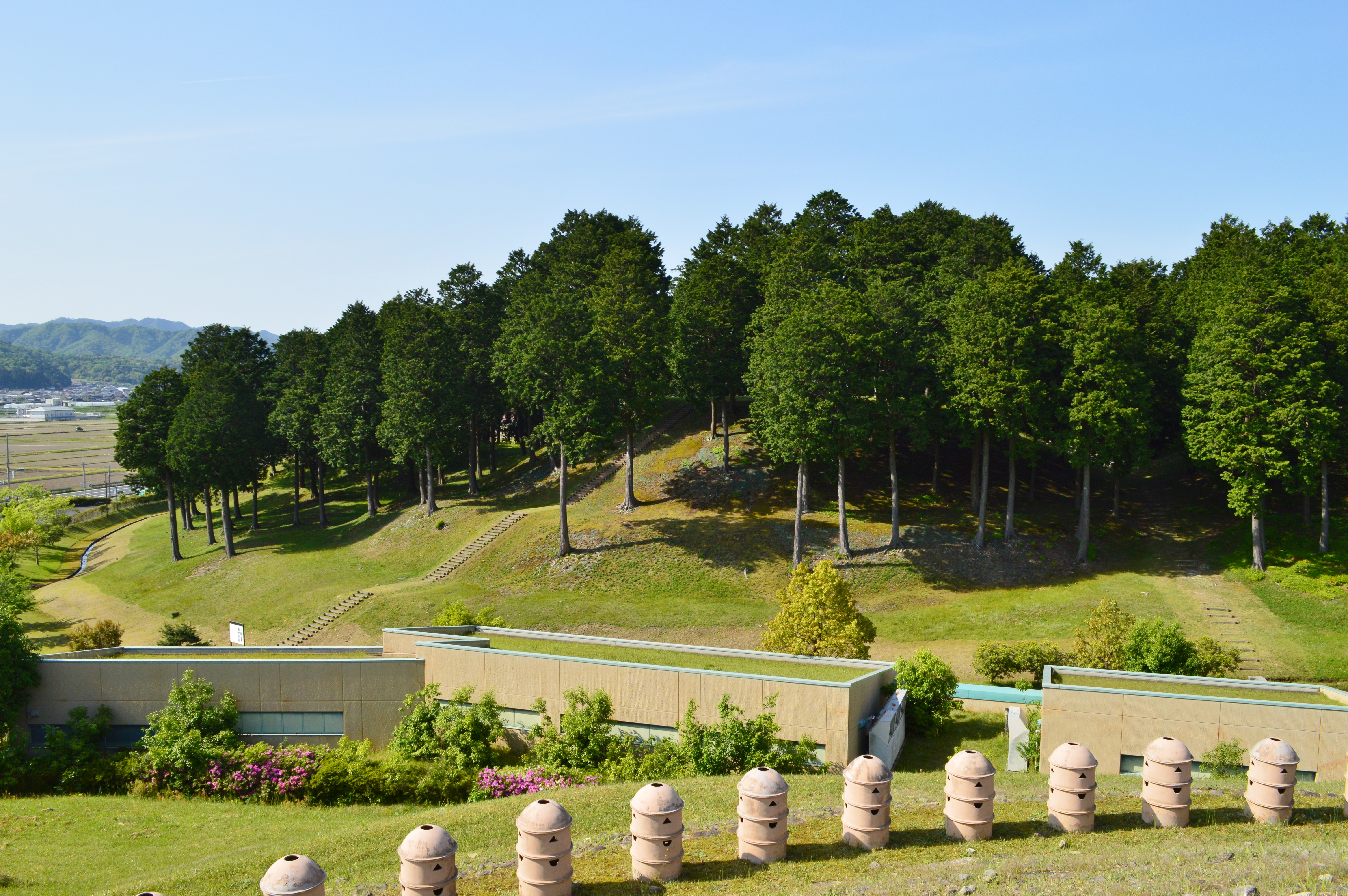 作山1号墳から望む蛭子山1号墳